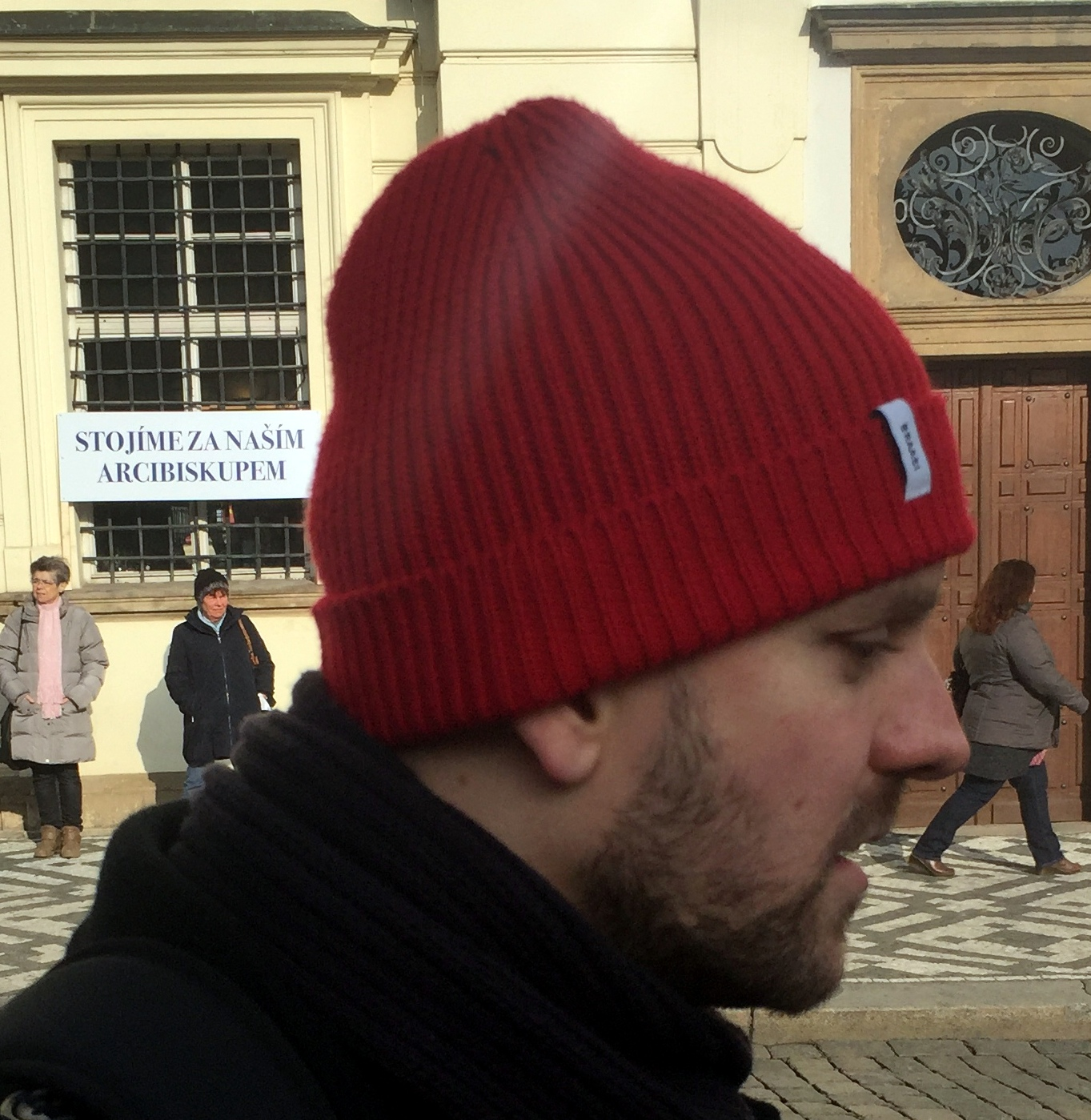 Jan Bierhanzl při organizaci protestu proti kardinálu Dukovi před Arcibiskupským palácem 14. 2. 2018